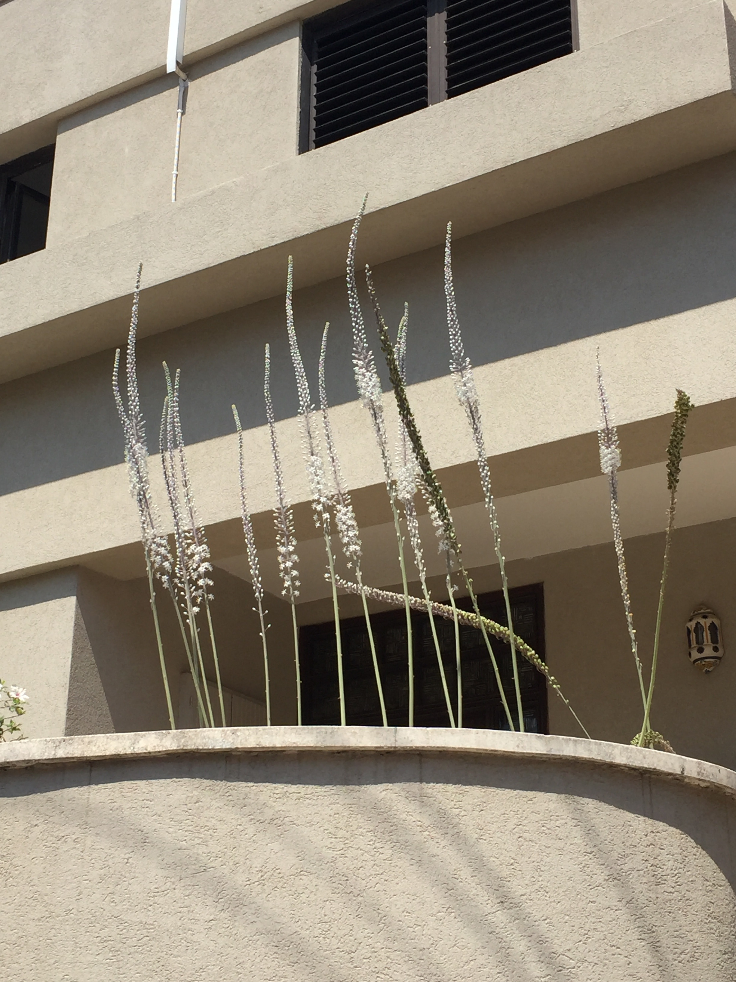 חצבים מבשרים את בוא הסתיו